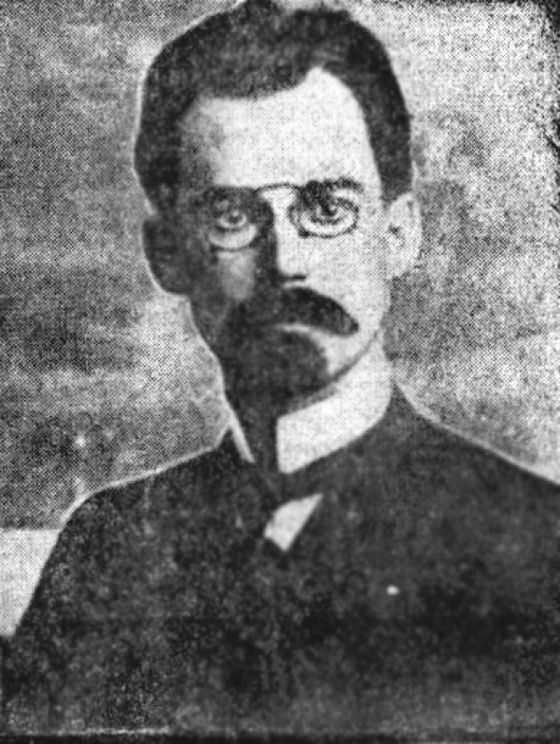 Семён Иванович Канатчиков (1879—1937) — советский партийный деятель.